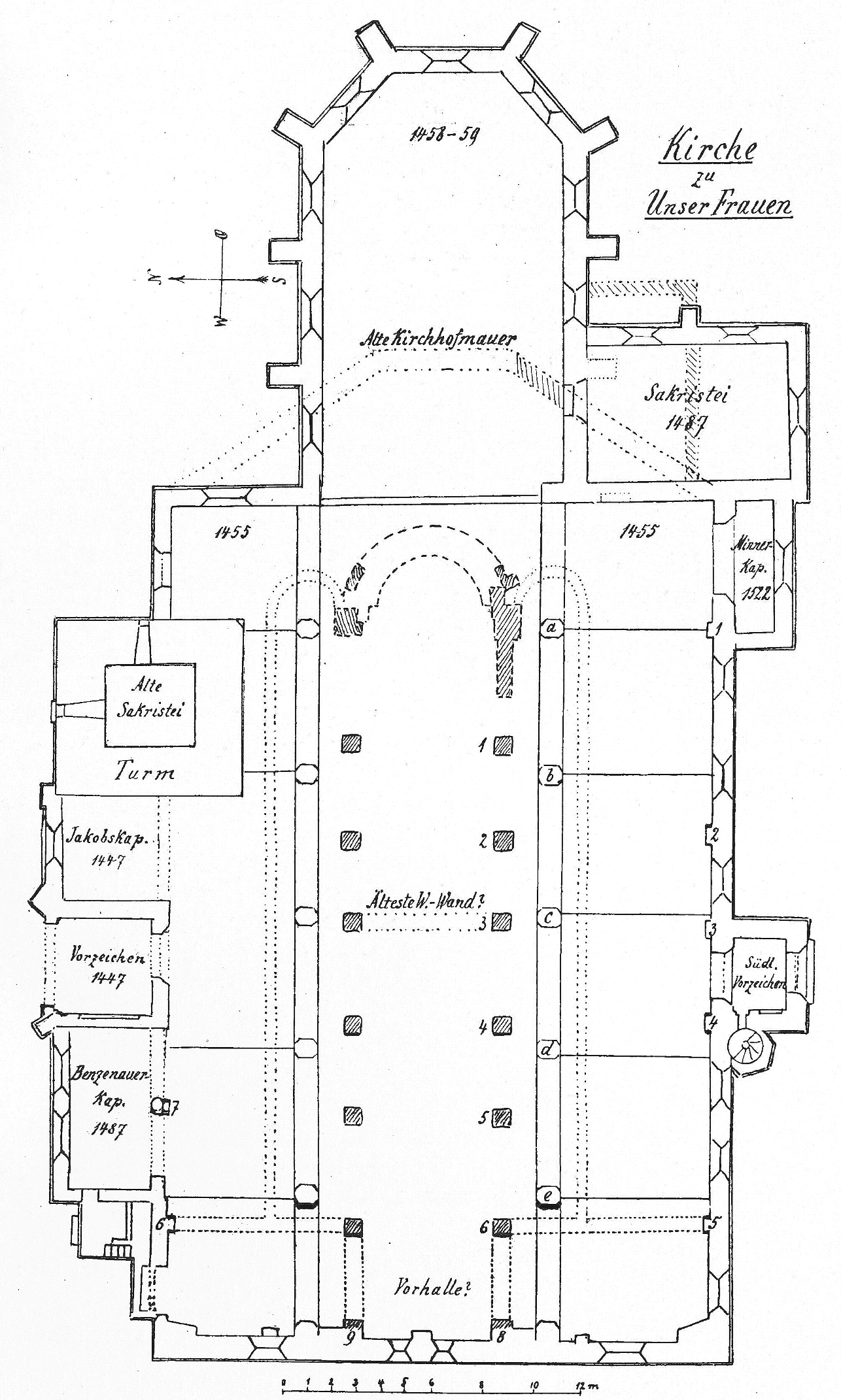 Grundriß der Frauenkirche in Memmingen, inkl. der Vorgängerkirche (gestrichelte Linien)